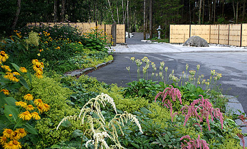 Inngangsparti for Japanhagen i Botanisk hage. Japanhagen er tegnet og utforma av den kjente japanske landskapsarkitekten Haruto Kobayashi. Den vart innvia 20. mai 2008.